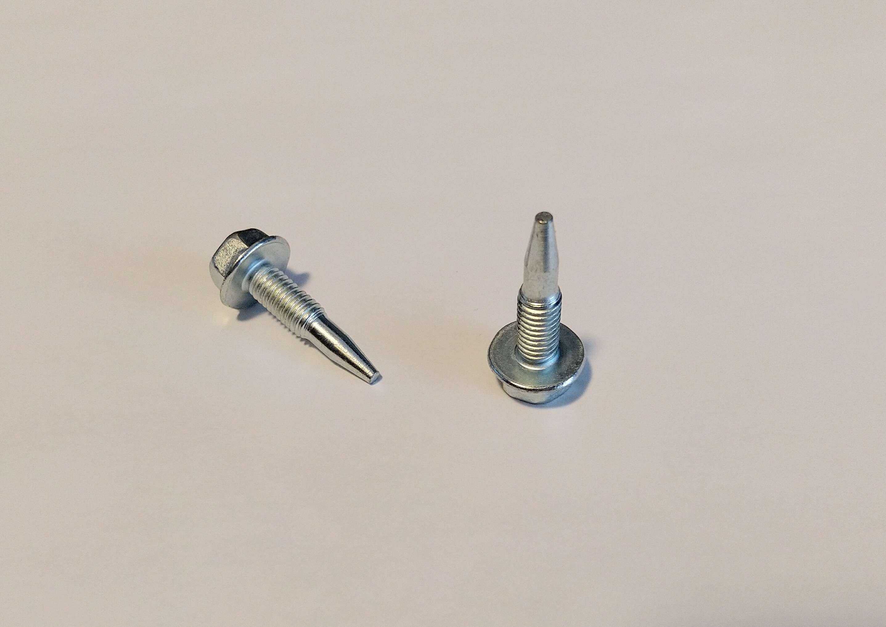 Two Toyota 2ZZ-GE lift bolts of the revised, updated design.